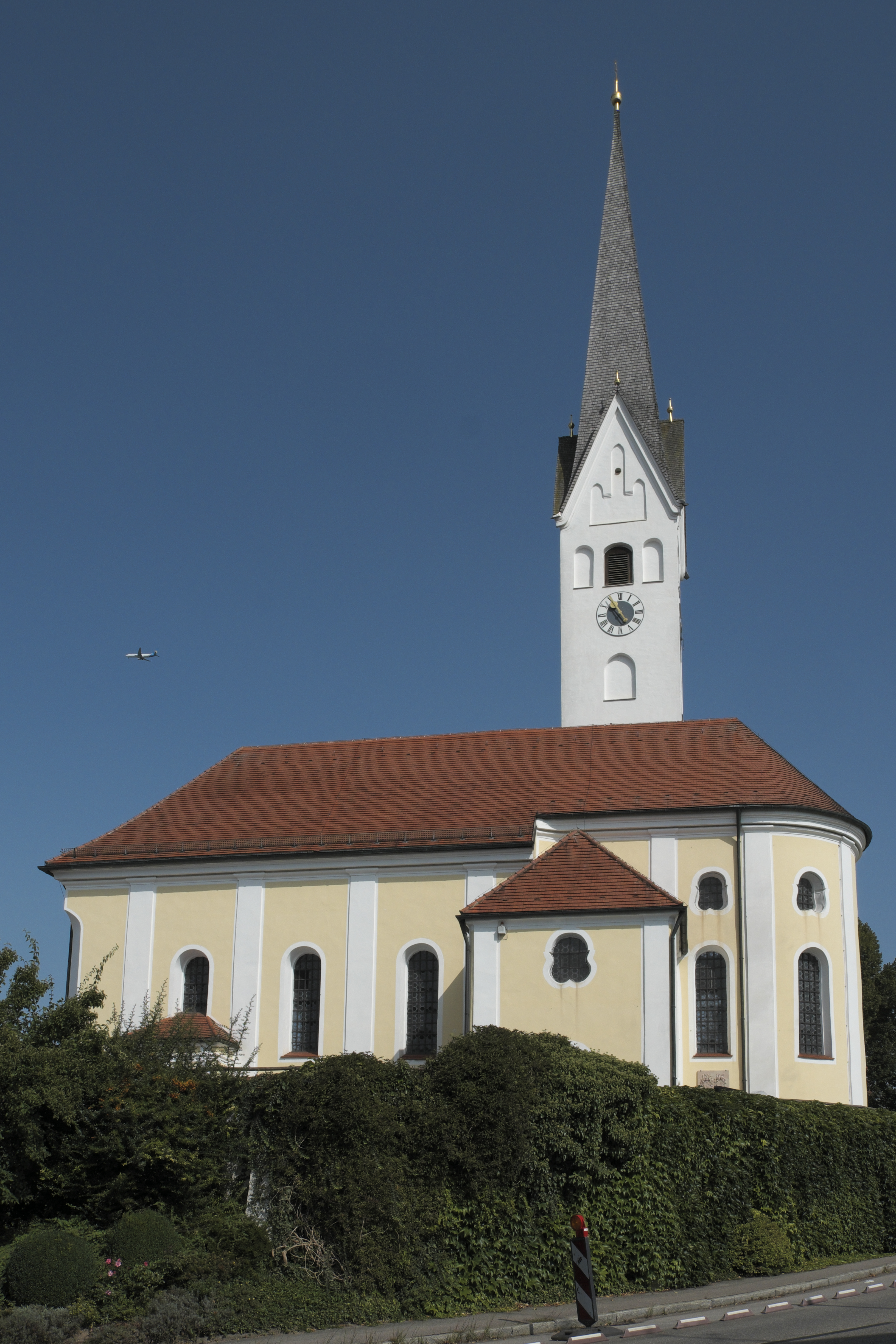 Katholische Pfarrkirche St. Florian in Fraunberg im Landkreis Erding (Bayern/Deutschland)